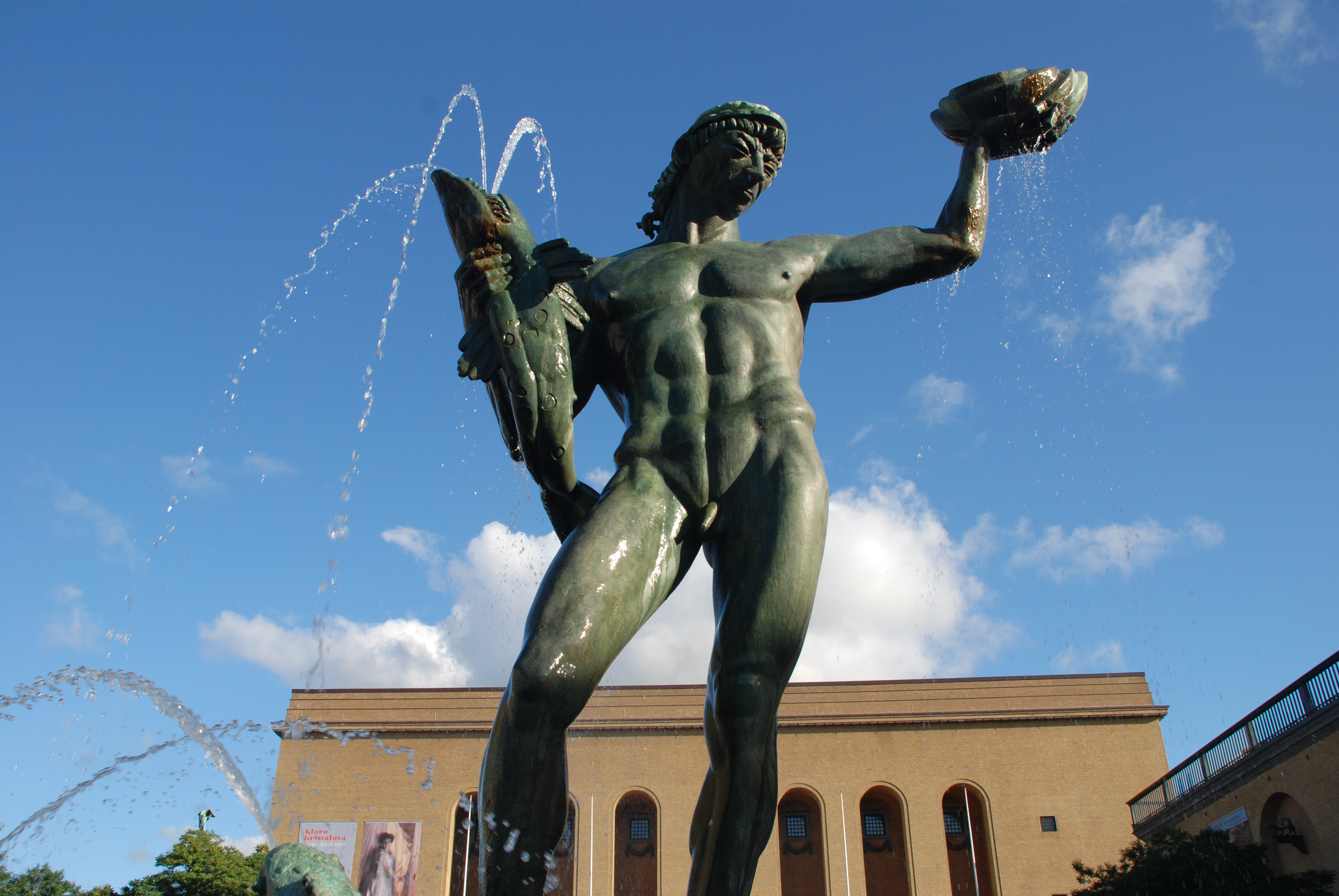 Statyn "Poseidon med brunnskar" på Götaplatsen i Göteborg. Utförd av Carl Milles.